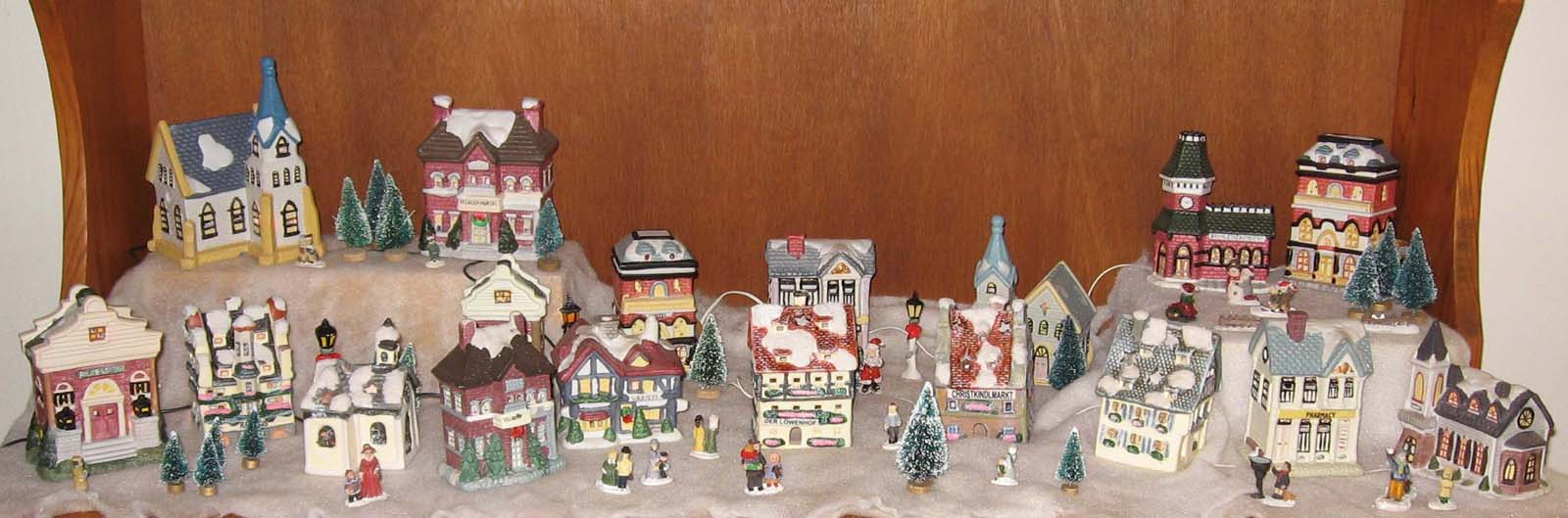 Kerstdorp. Zelfgemaakte foto.